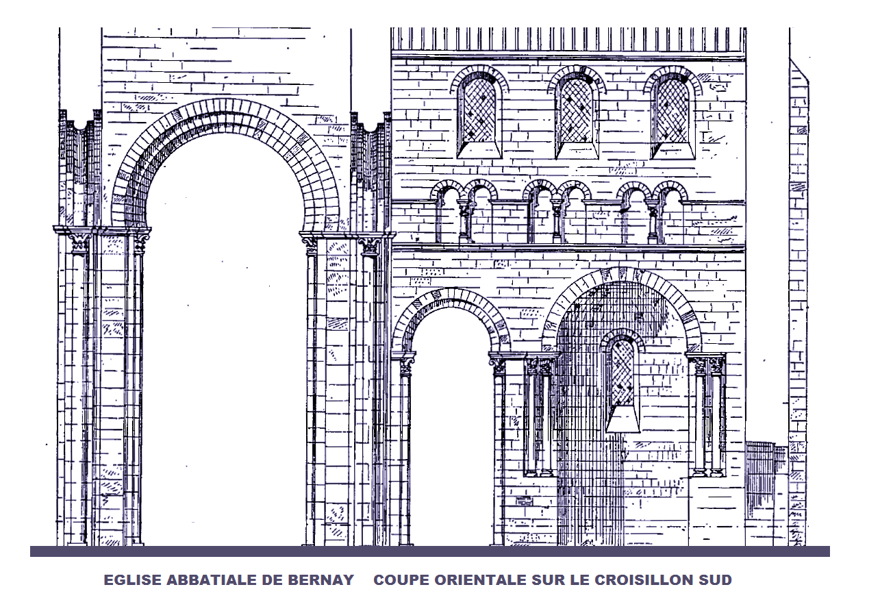 Abbaye de Bernay, coupe orientale sur le croisillon sud (image du domaine public modifiée, Congrès archéologique de Caen, 1909)